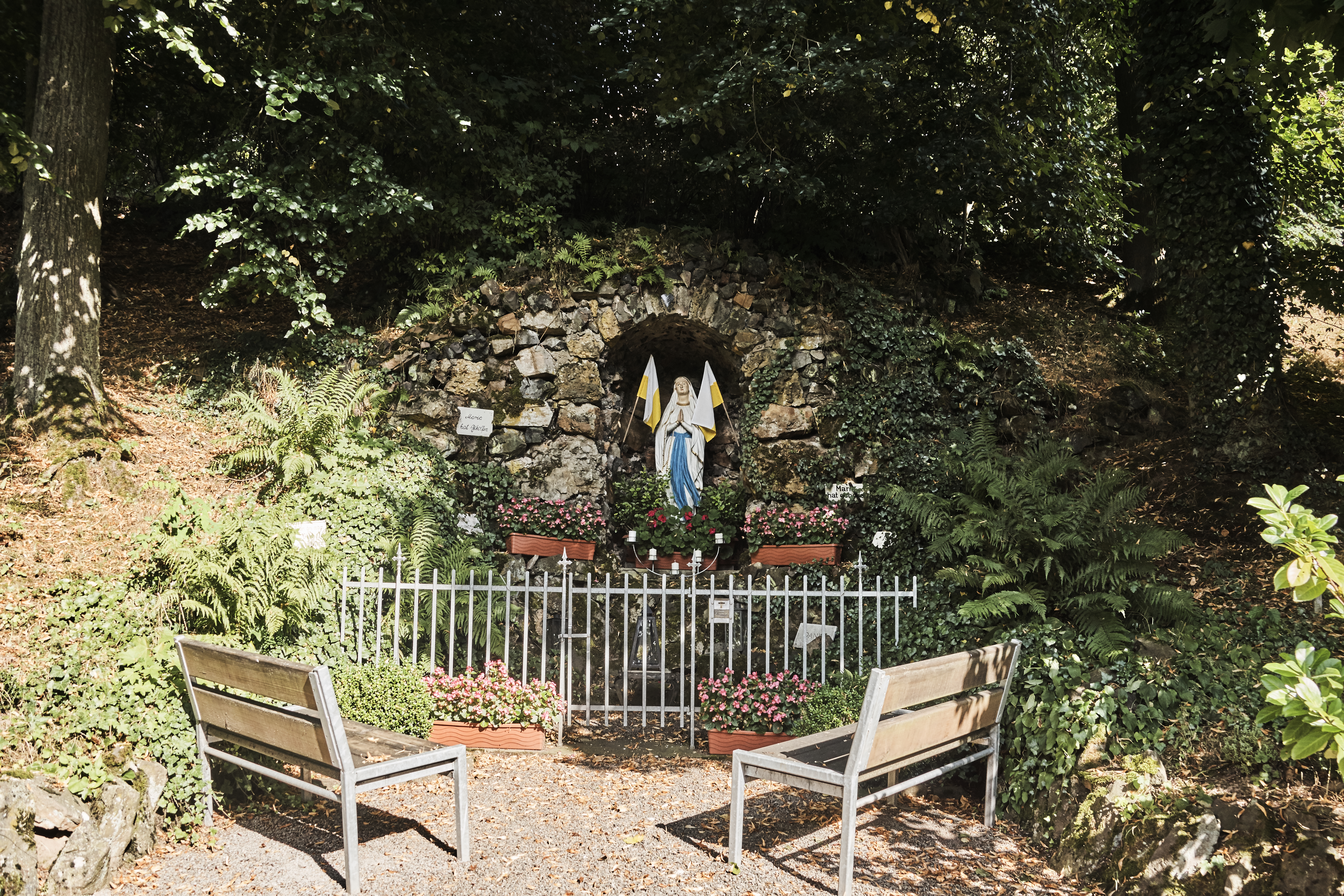 Die Mariengrotte in Weyhers. Es war die erste, welche in der Diözese Fulda errichtet wurde.